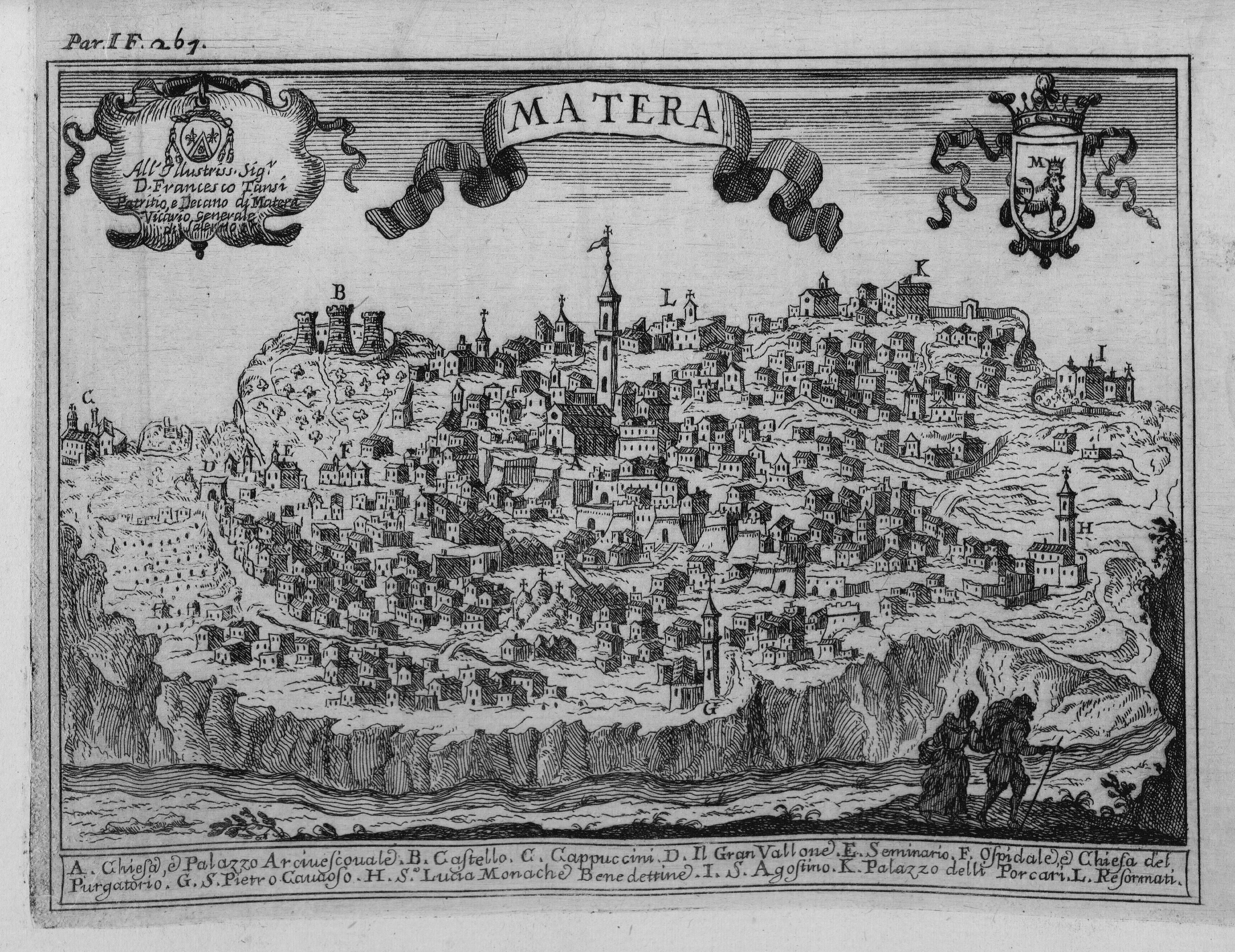 Autor: Pacichelli, Giovanni Battista, 1641-1702 Descripción bibliográfica: Il regno di Napoli in prospettiva : diviso in dodeci provincie, in cui si descrivono la sua Metropoli Fidelissima città di Napoli ... Opera postuma divisa in tre parti / dell'abatte Gio. Battista Pacichelli ; Parte prima [-terza] ... Del regno di Napoli in prospettiva / dell'abate Pacichelli. Parte prima. - In Napoli : nella Stamperia di Michele Luigi Mutio, 1703. - v. : principalmente il.; 4º . - Inic. adorn. y frisos dec. - Grab. calc. y h. pleg. grab. calc. de mapas de Cassianus de Silva. Ilustrador: Cassiano De Silva, Francesco, il. Impresor: Muzio, Michele Luigi, imp. Lugar de impresión: Italia. Nápoles Localización: Vea la ilustración en su contexto